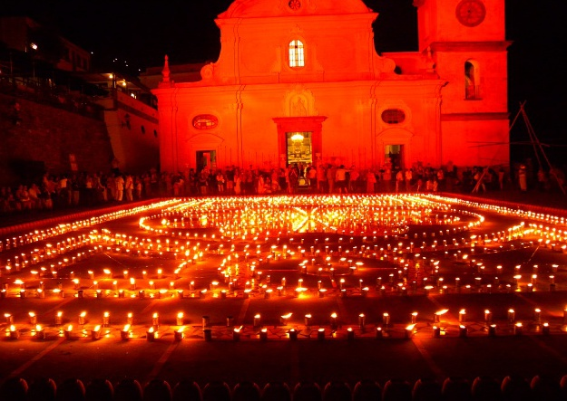 Wikipedia: Praiano